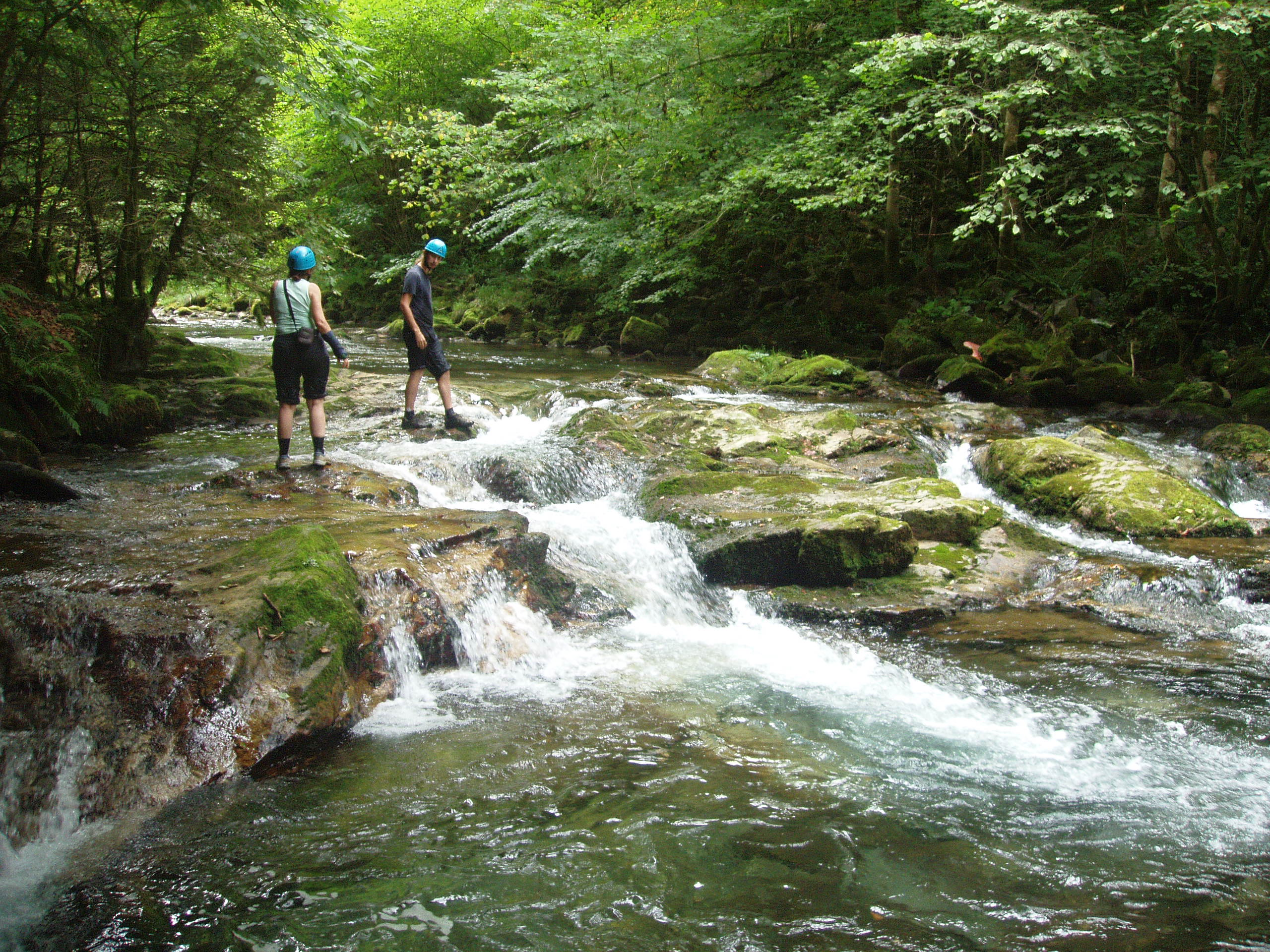 La rando aqua permet de découvrir les secrets de ce magnifique cours d'eau préservé.